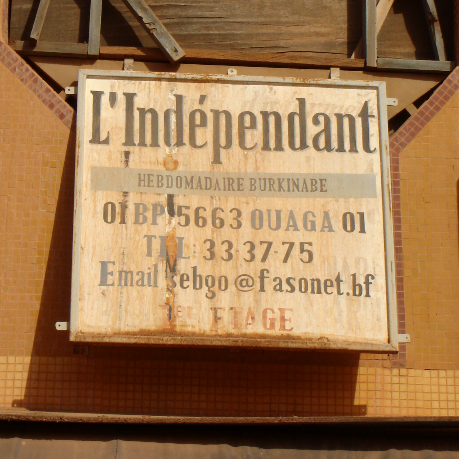 Burkina Faso: Schild am Sitz der Wochenzeitung L'Indépendant in Ouagadougou